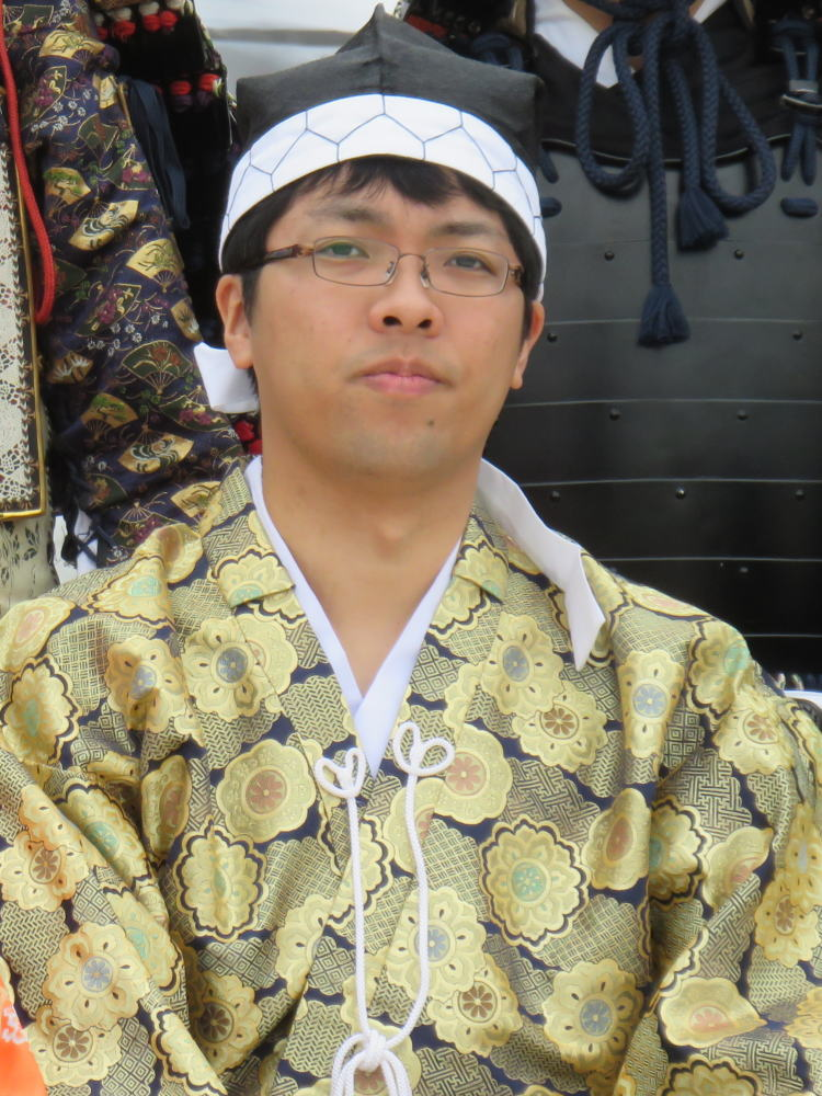 将棋棋士の大石直嗣（令和元年年１１月、姫路市で行われた人間将棋にて）